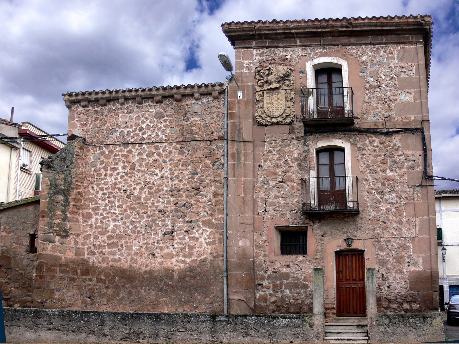 Palacio del Conde de Avellanosa en Bobadilla, La Rioja - España.